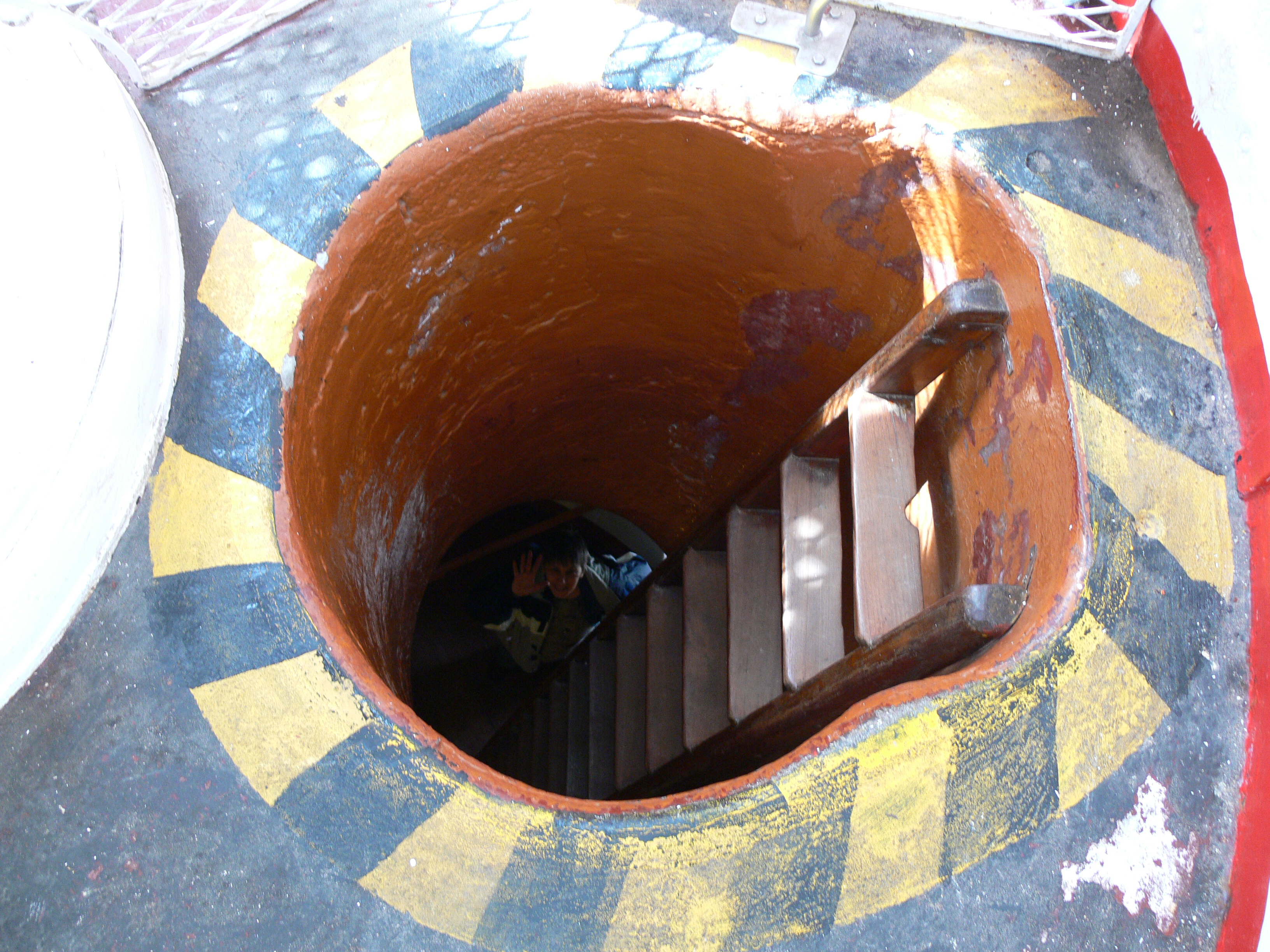 Aufstieg zur oberen Plattform, Leuchtturm am Kap Agulhas im Distrikt Overberg, Provinz Westkap in Südafrika.